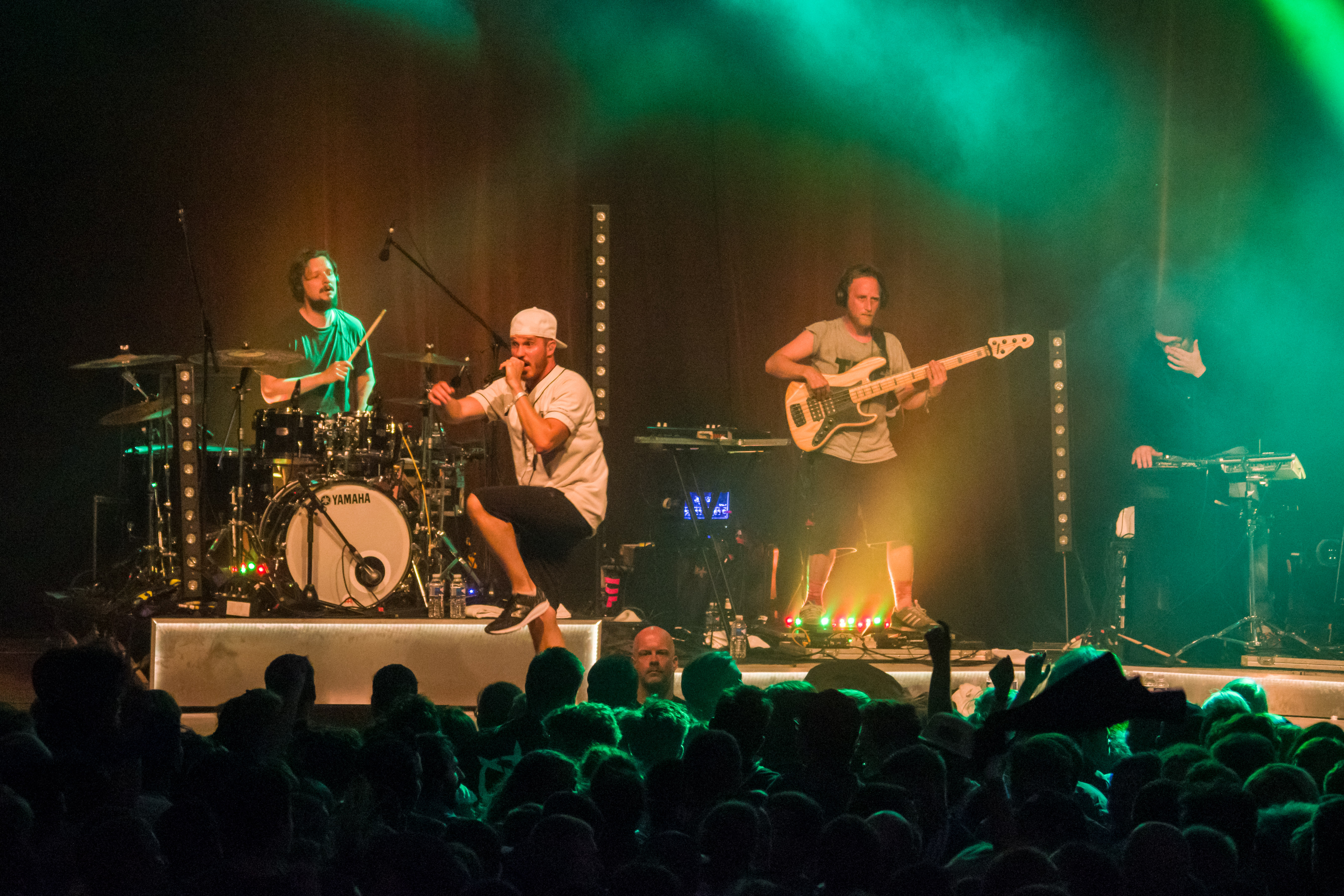 Das Zelt-Musik-Festival 2017 in Freiburg im Breisgau 15.07.2017 Irie Révolté